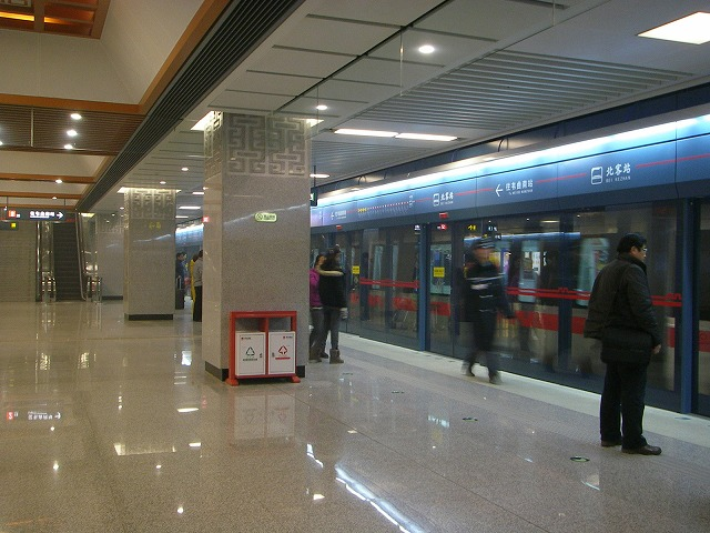 2011 winter